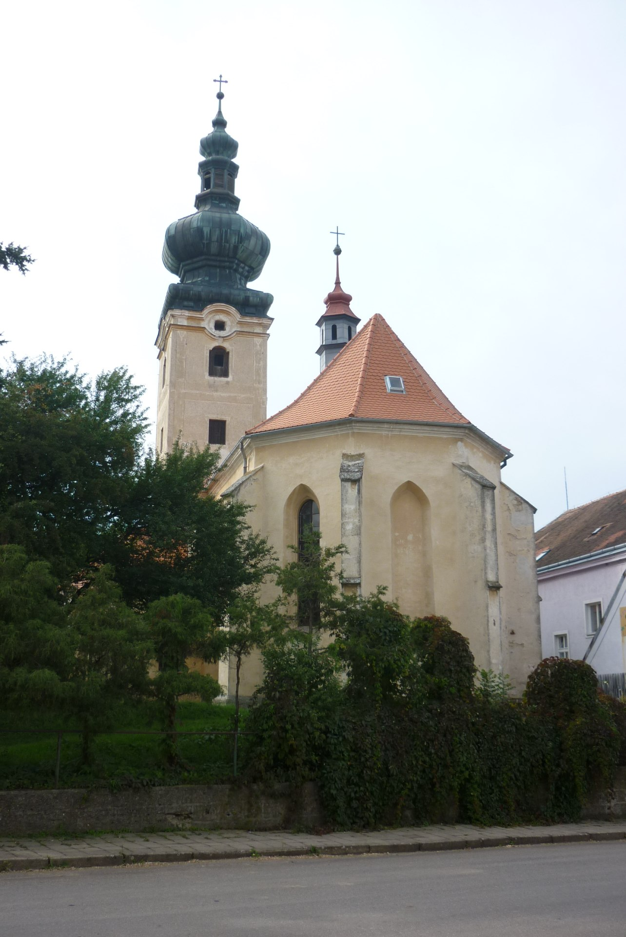 Kostel Narození svatého Jana Křtitele v Dešné